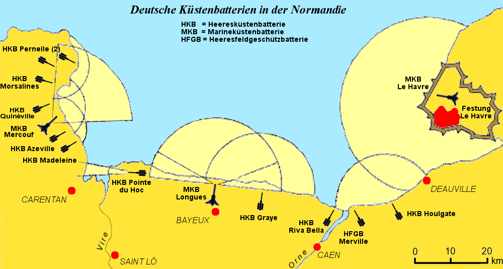 Description: Deutsche Heeresbatterien in der Normandie 1944 Source: self-made by User:W.wolny